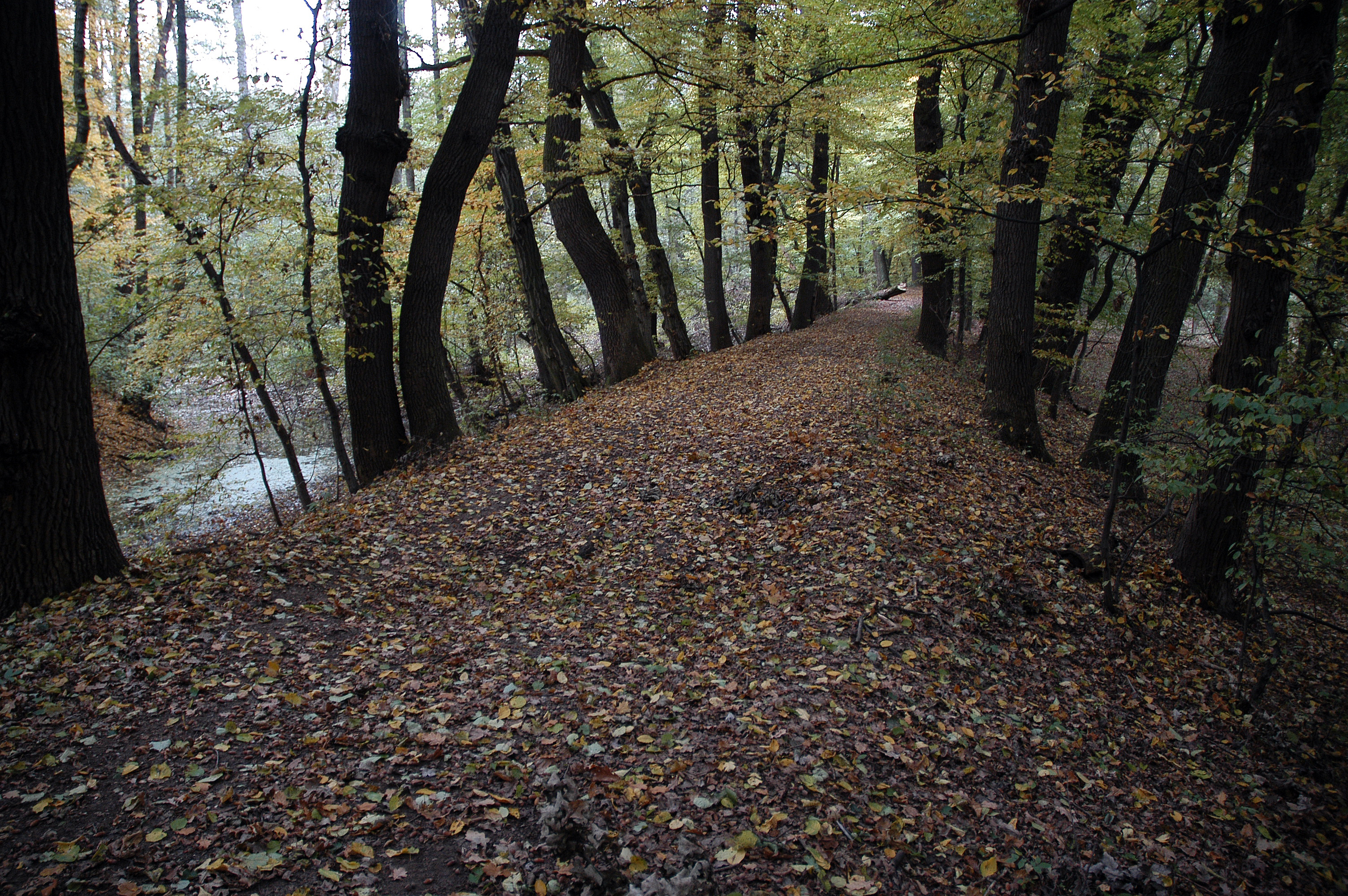 Cesta vedoucí po vrcholu Budečské hráze v Přerově nad Labem.